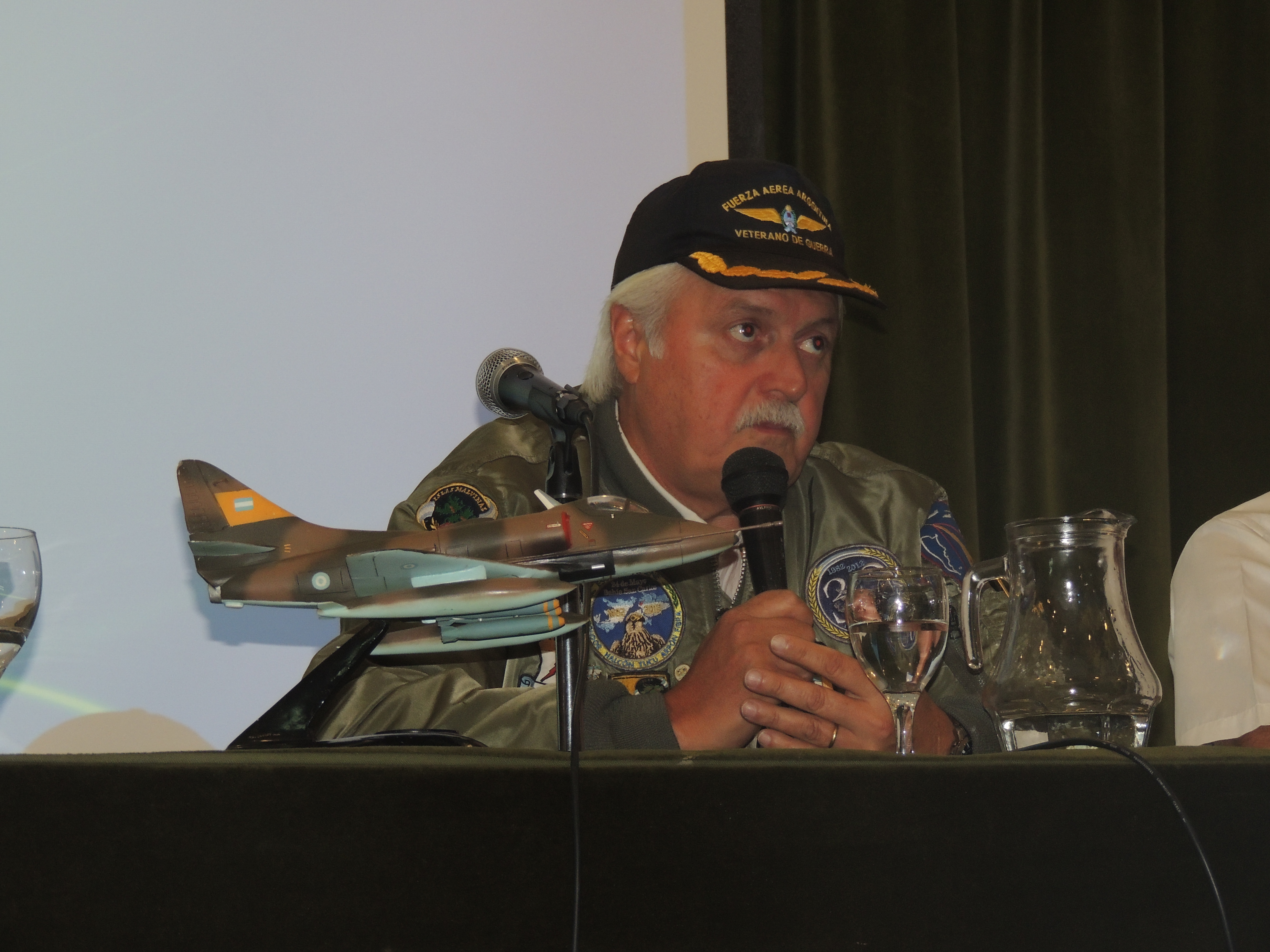 Luis "Tucu" Cervera durante una charla en la Universidad Kennedy